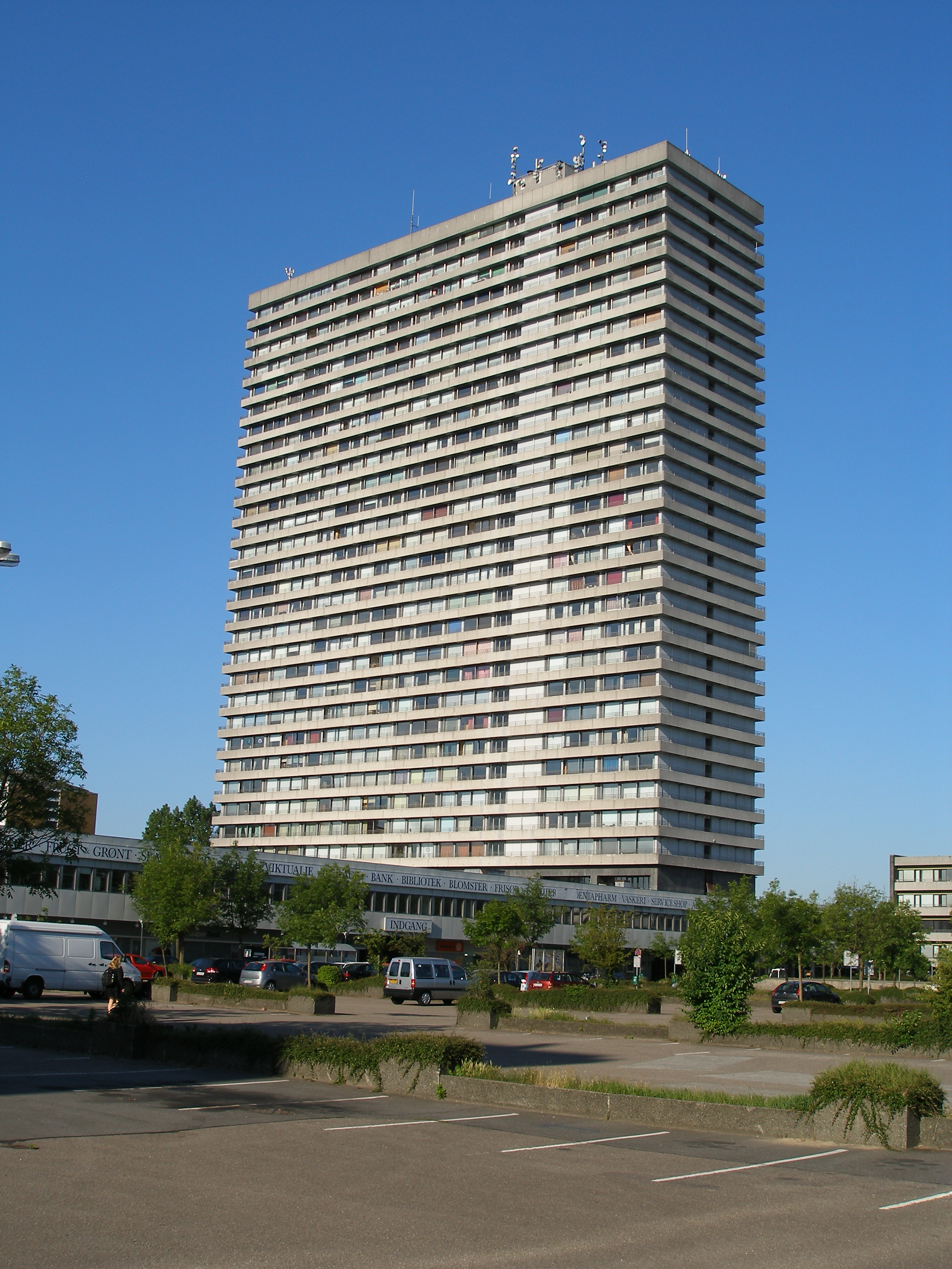 Domus Vista, Nordens Plads, Frederiksberg, Denmark